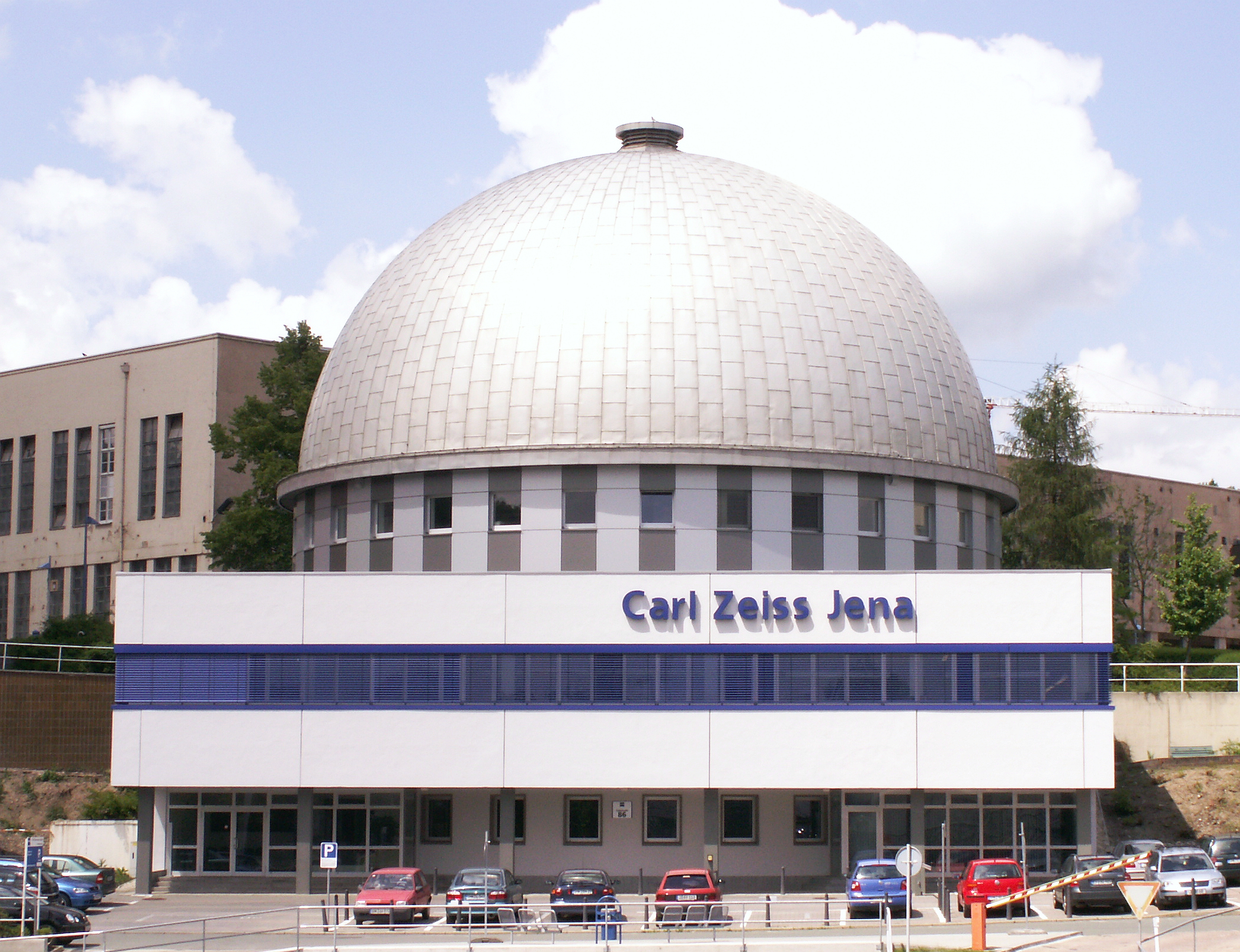 Carl Zeiss Jena GmbH, Abteilg./Bereich Planetarien, an der Carl-Zeiss-Promenade in Jena Göschwitz - Foto Wolfgang Pehlemann PICT0199